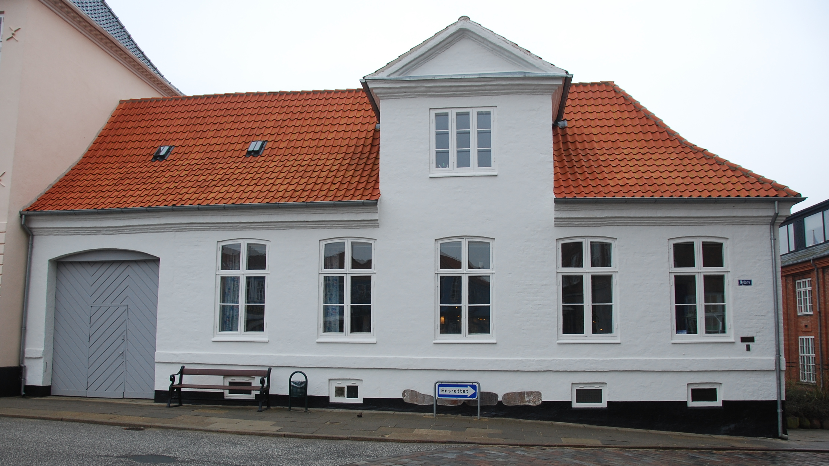 Den fredede bygning "Den lille gård på Torvet" i Viborg.